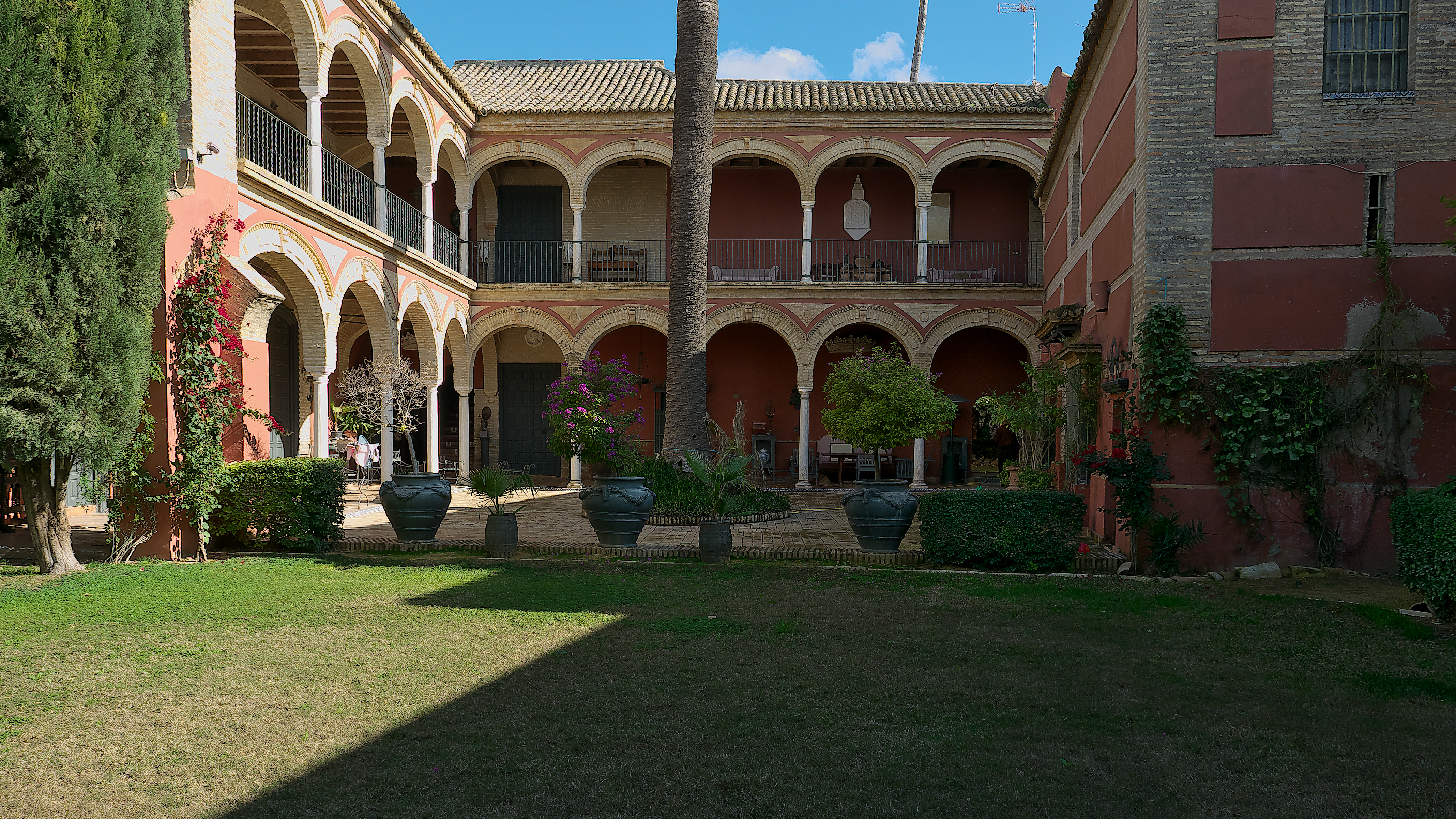 Arquitectura del siglo XVII en Marchena. Lorenzo Coullaut Valera compra esta casa a los herederos de la familia Montiel (1917).